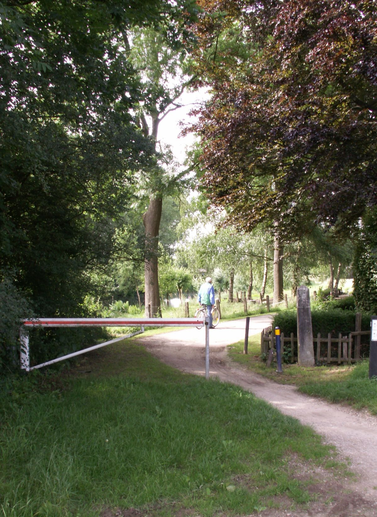 Landschafts-Motive aus dem Heinsberger Land: Grüne Grenze zwischen Deutschland und den Niederlanden bei Wassenberg